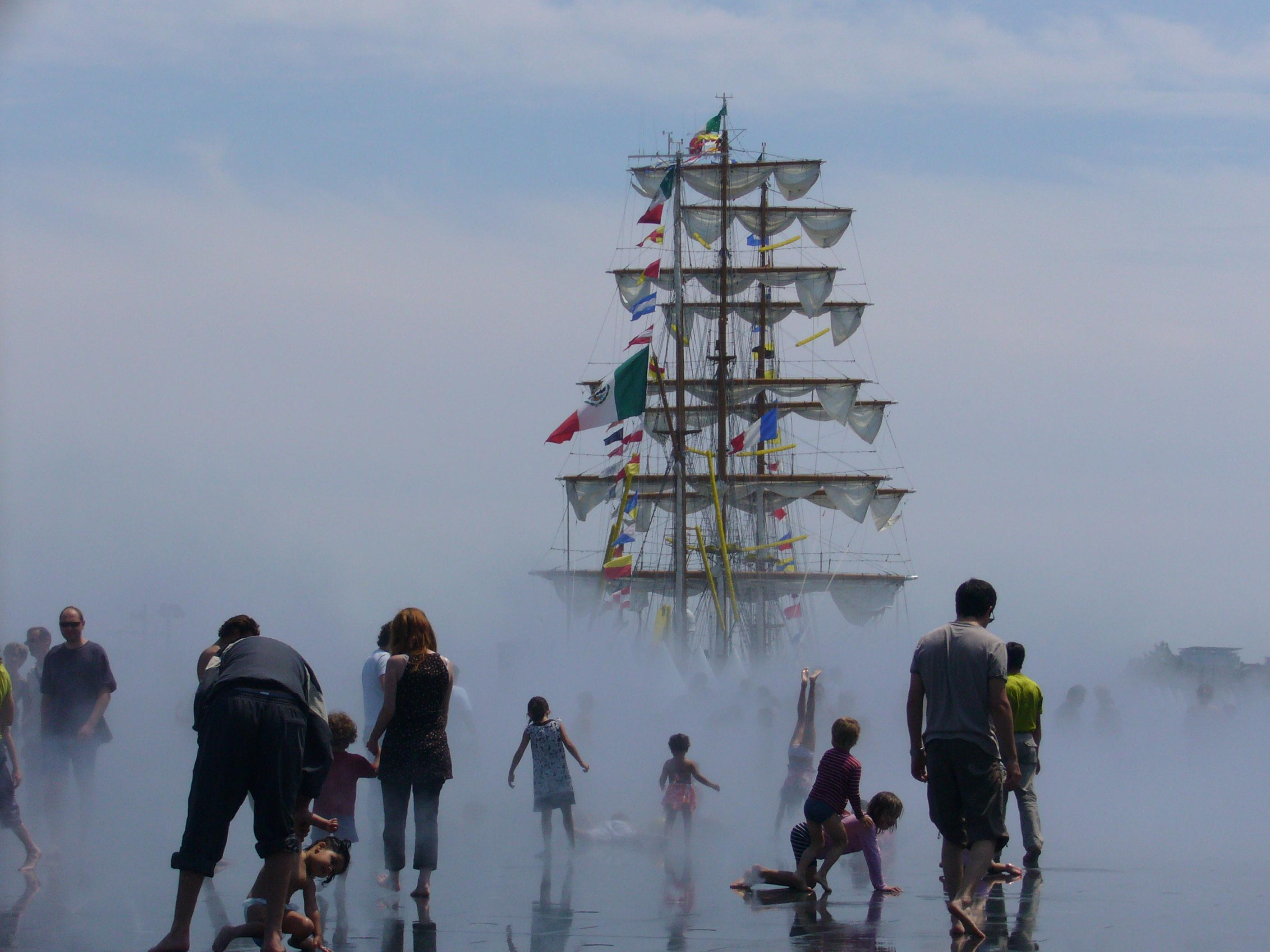 Cuauhtemoc dans la brûme du miroir d'eau